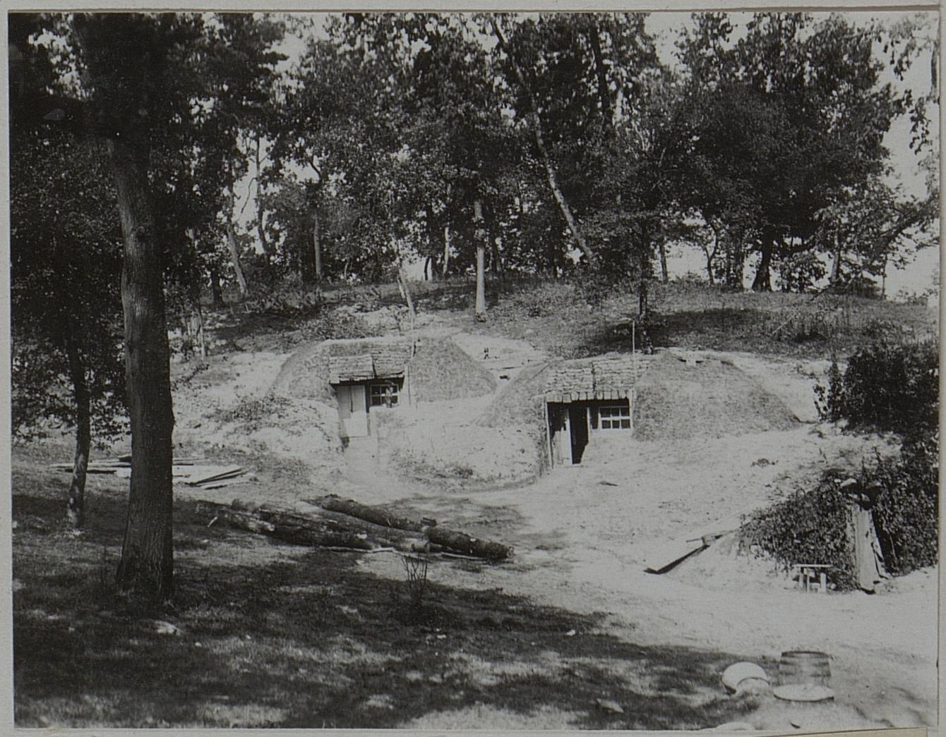 Kaiserschanze in Szelwowo